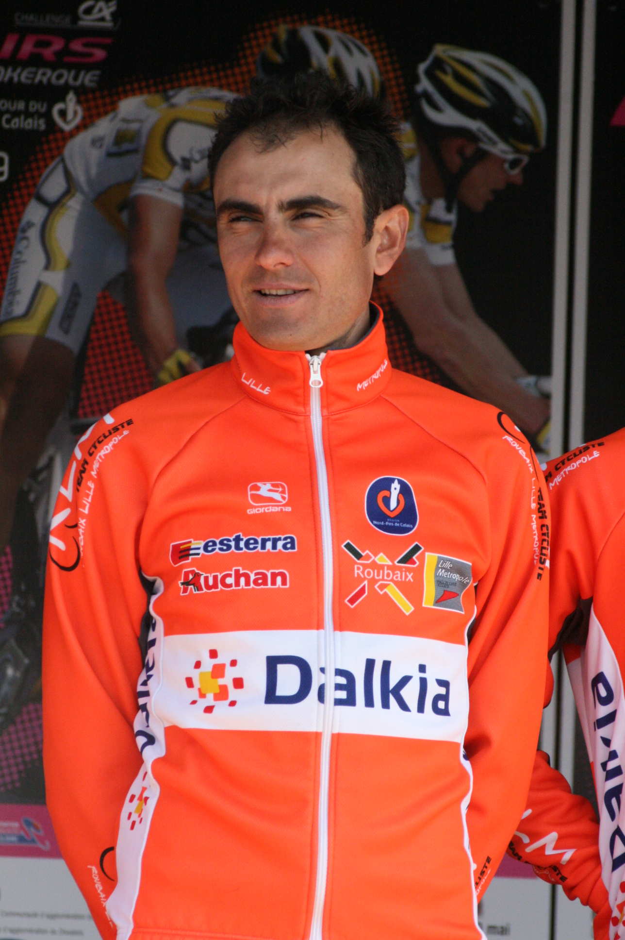 Renaud Dion, lors de la présentation des équipes des 4 jours de Dunkerque 2010